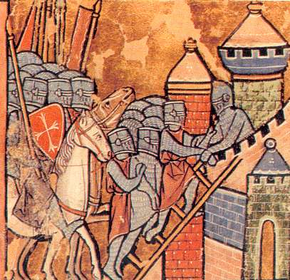 Узяцце Антыёхіі